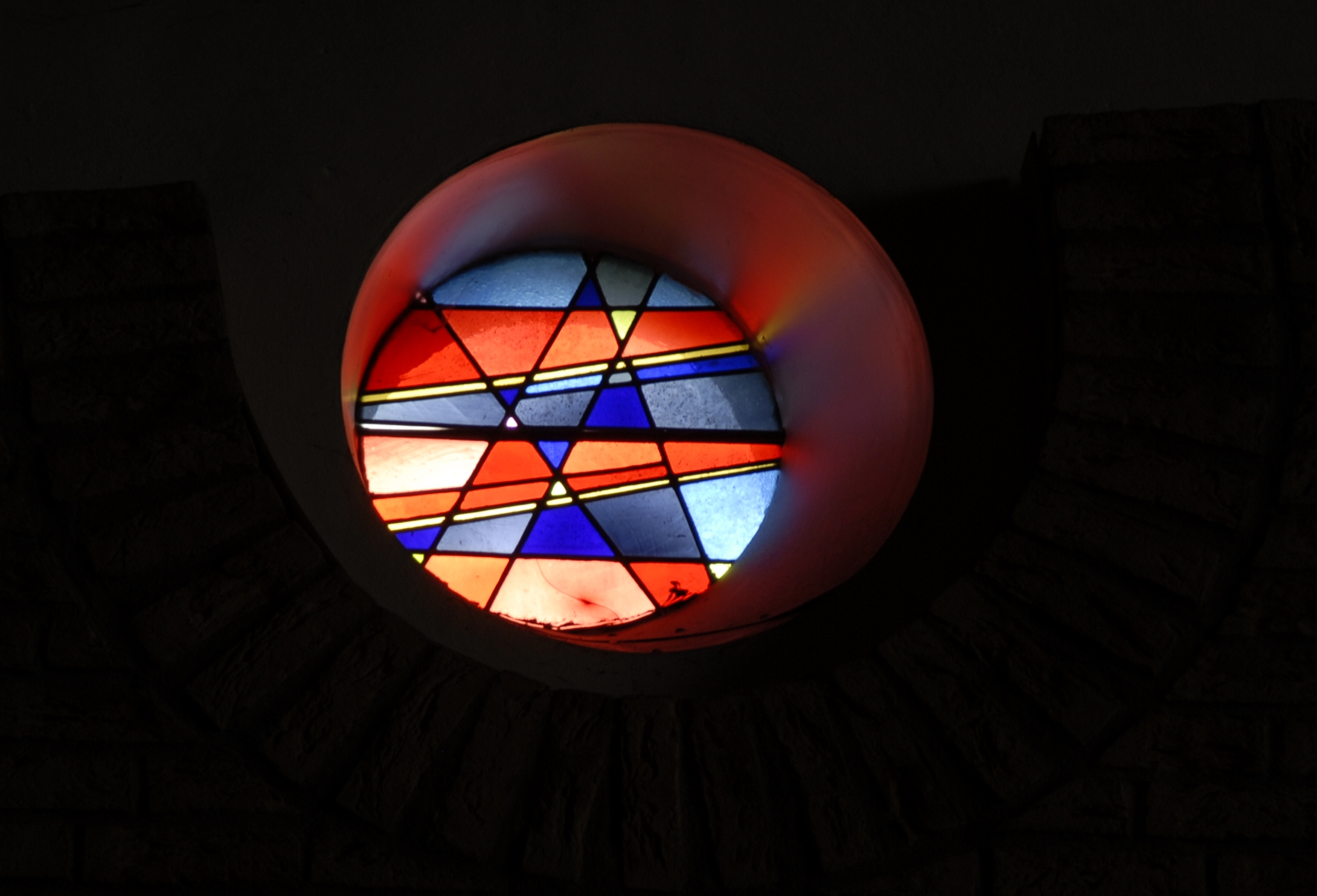 Seitenfenster der Kirche von Innenraum aus aufgenommen